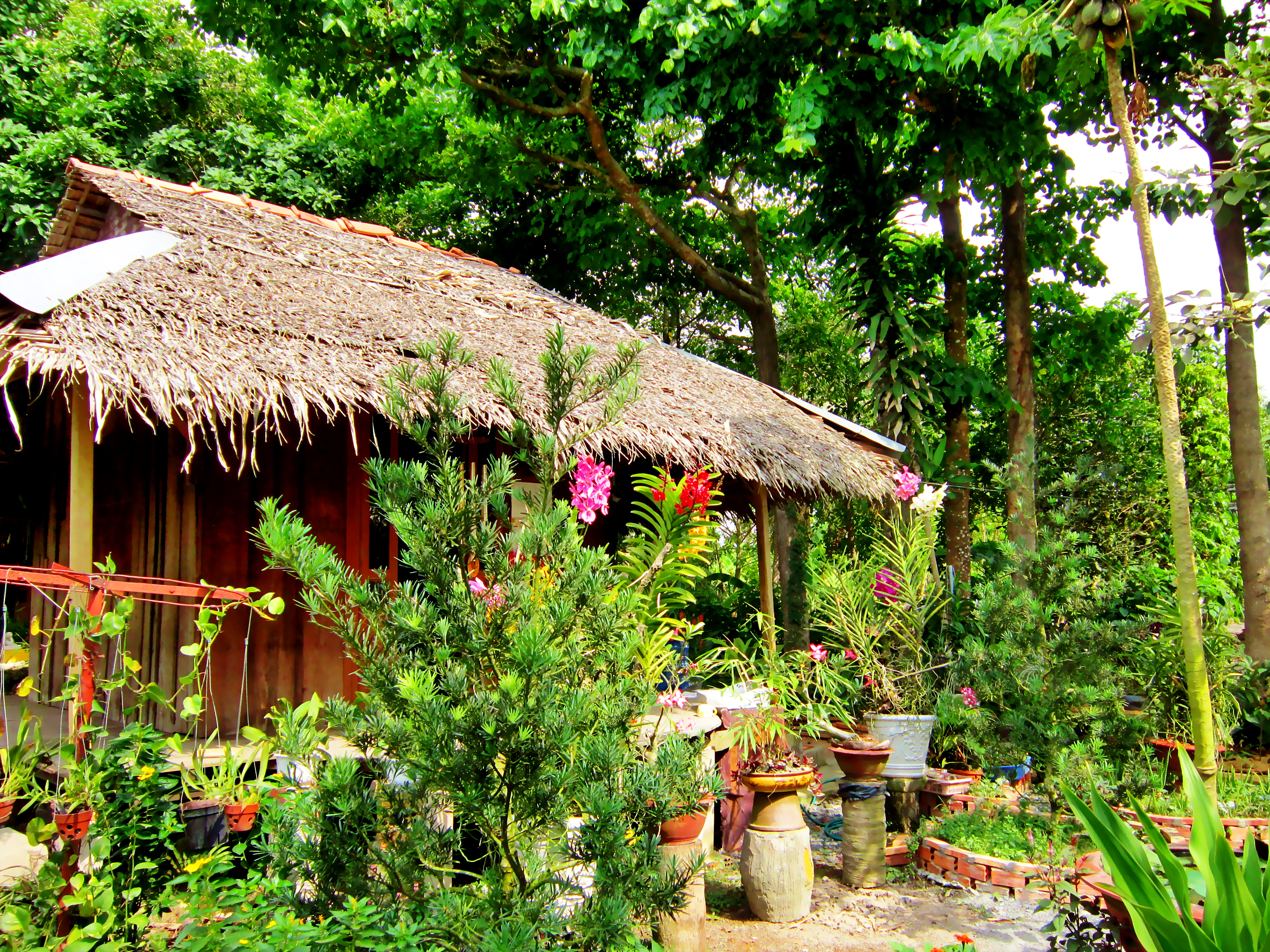 Một nhà ở với sàn ván, ván vách và mái lợp bằng lá ở Thoại Sơn (An Giang, Việt Nam).